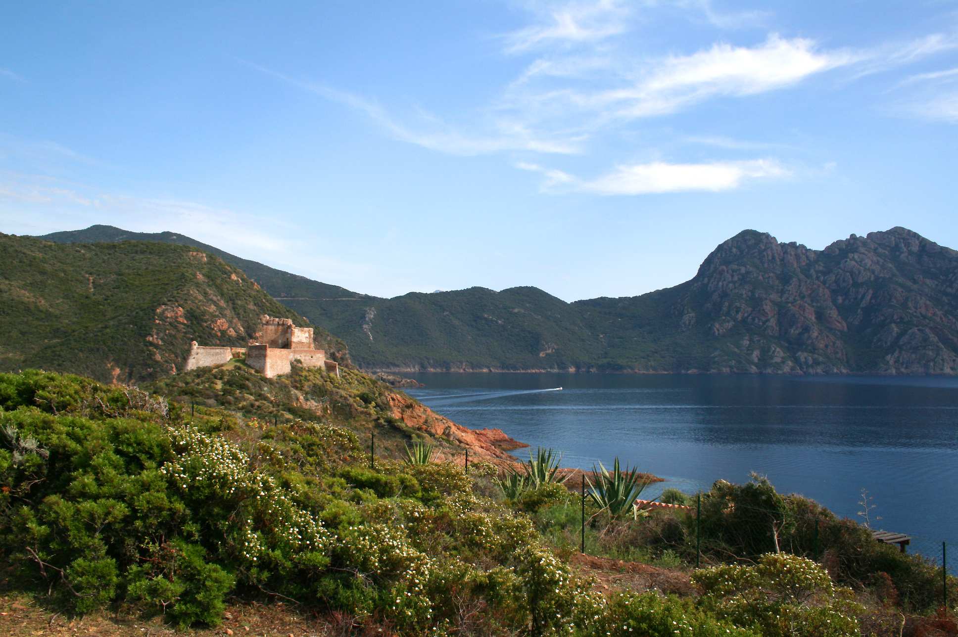 Osani ( Corse-du-Sud) - France, la forteresse génoise et le Golfe de Girolata.